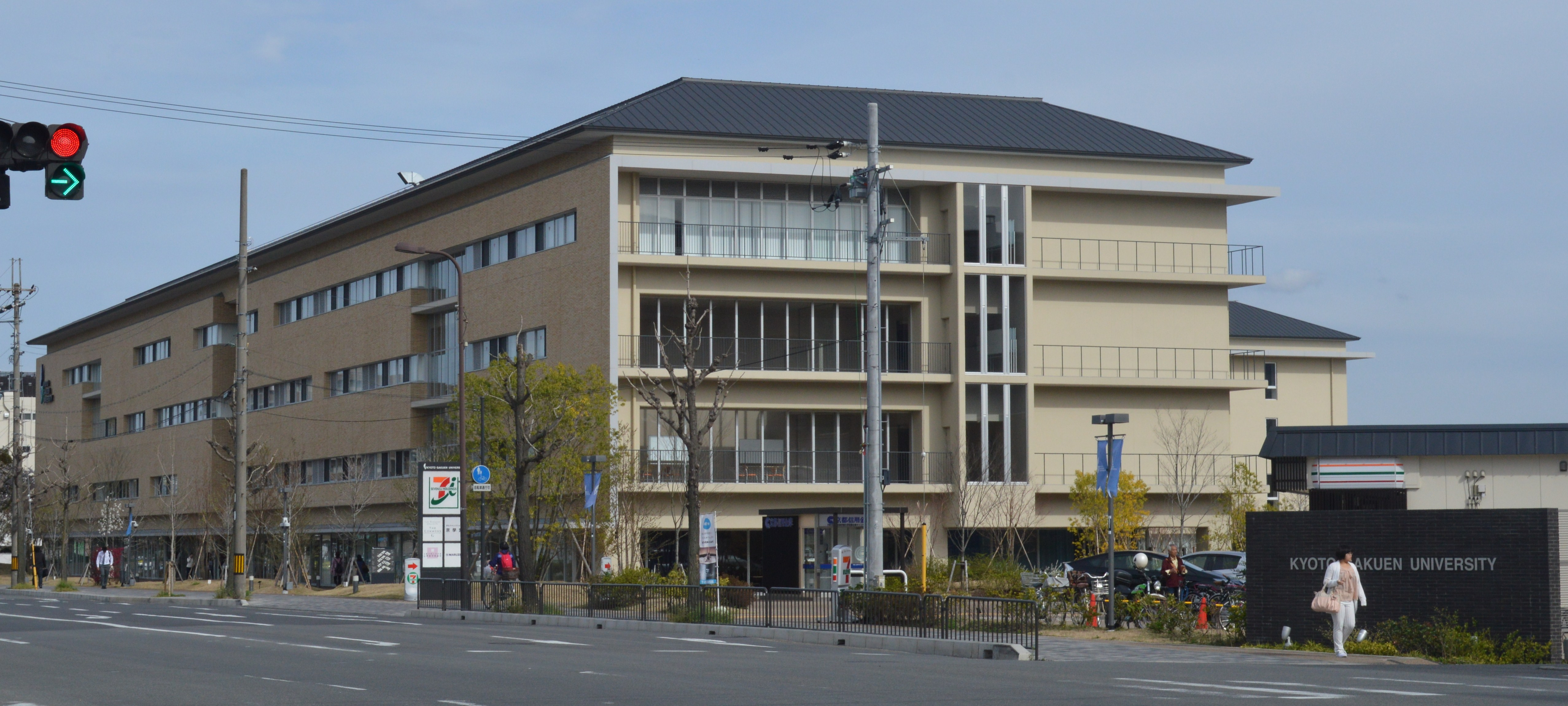 京都学園大学 京都太秦キャンパス 北西・天神側御池交差点から